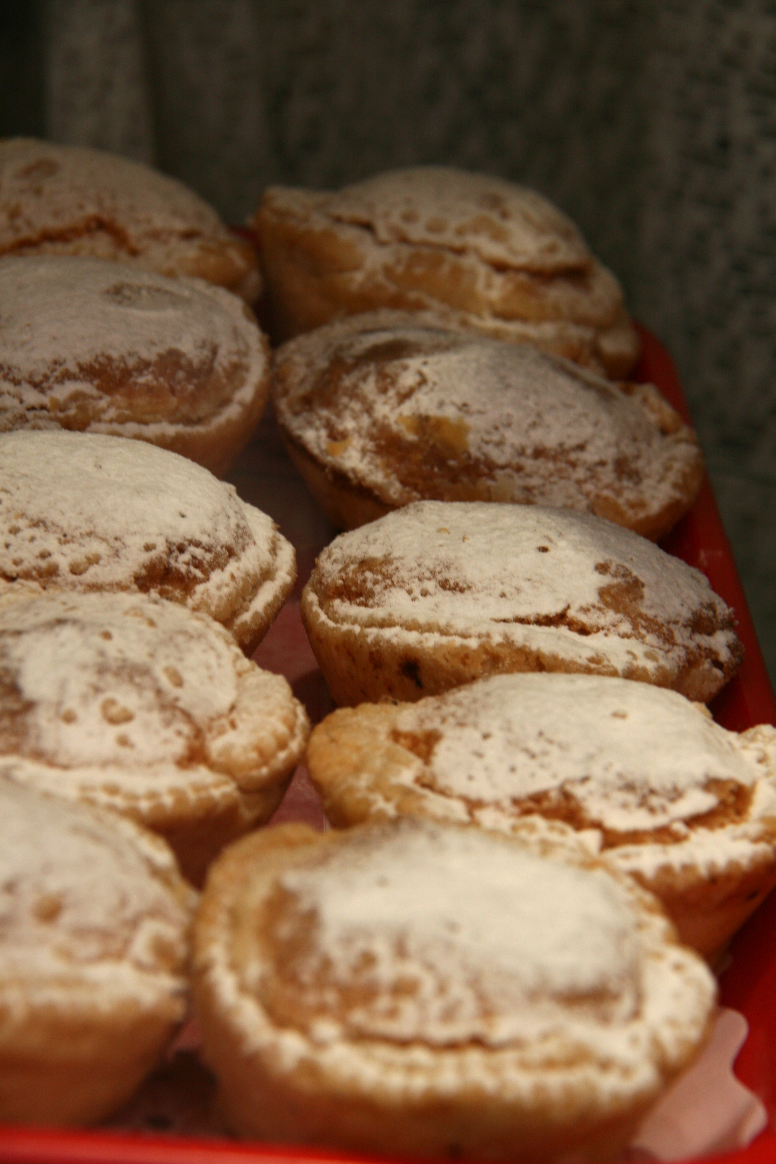 Marmitones - Marmitón - Lhardy